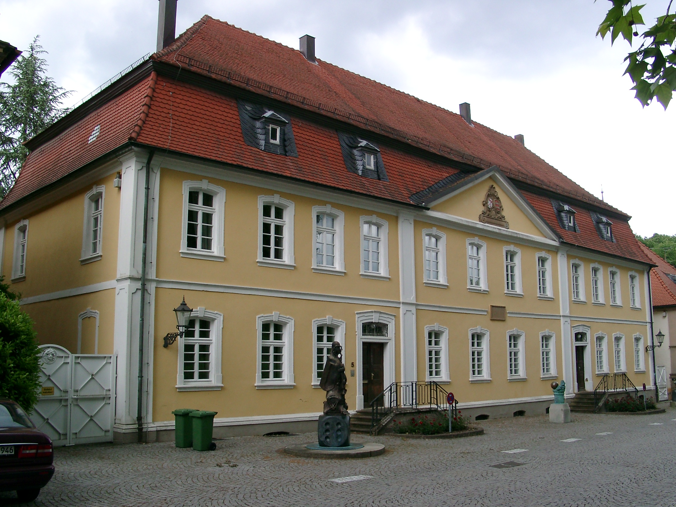 Angelbachtal, Ortsteil Eichtersheim, Friedrich Hecker-Haus